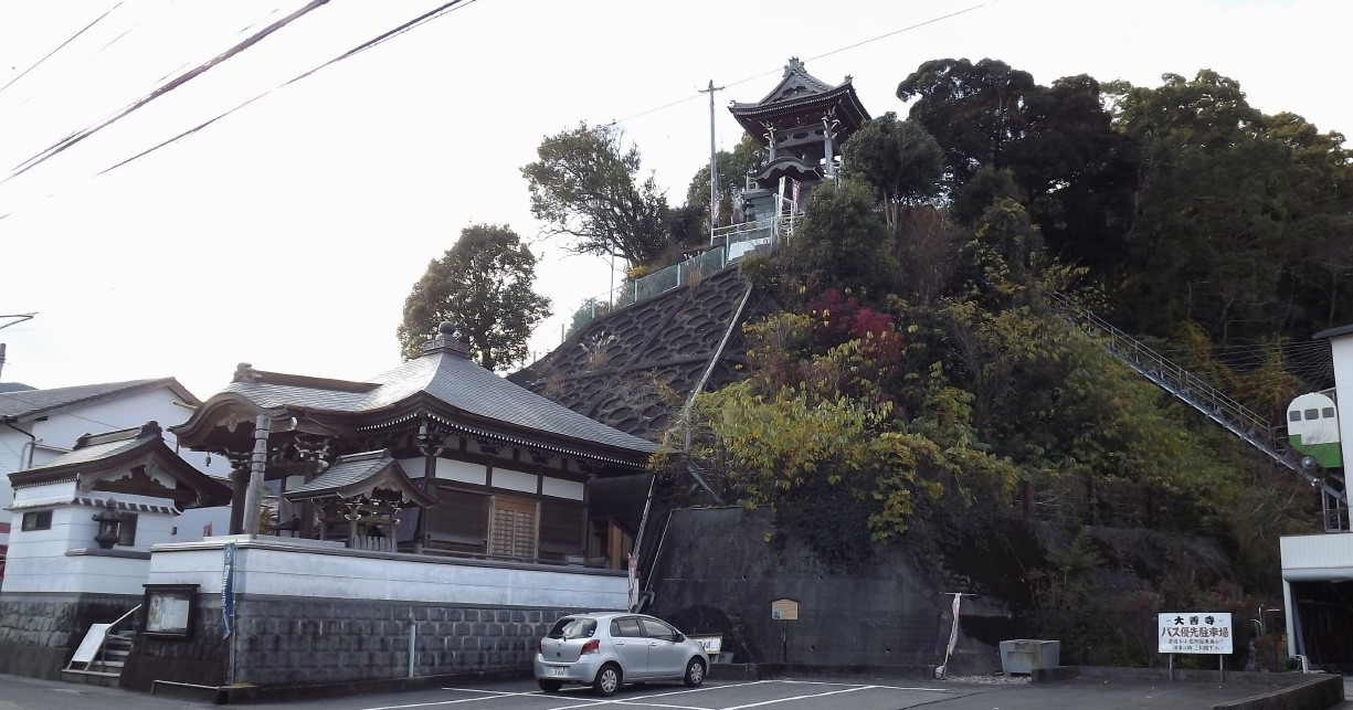 下の大師堂の所が二つ石遺跡で、山上に本堂がある